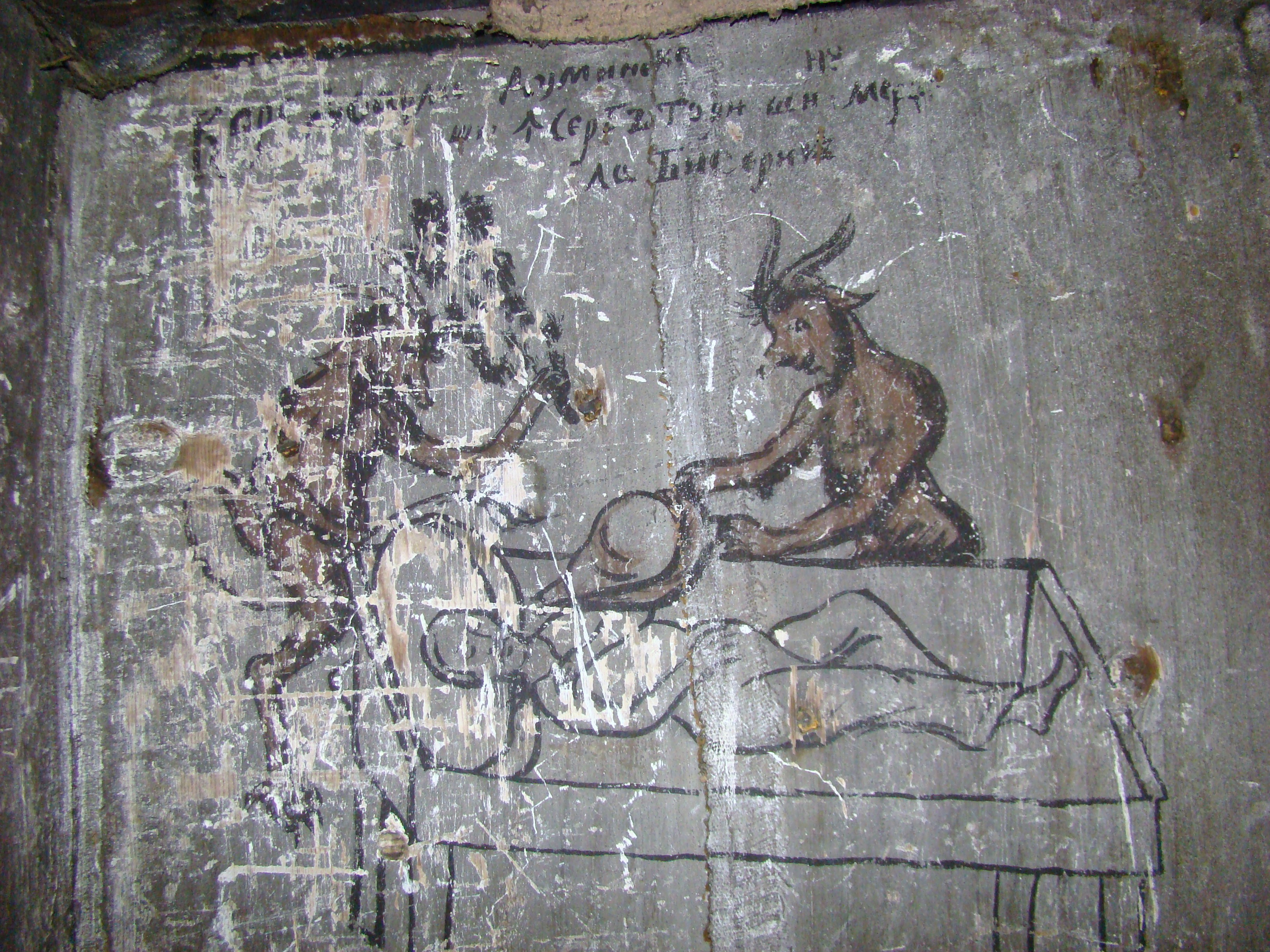 Biserica de lemn "Sfântul Dumitru" , sat DUBEŞTI; comuna OHABA LUNGĂ